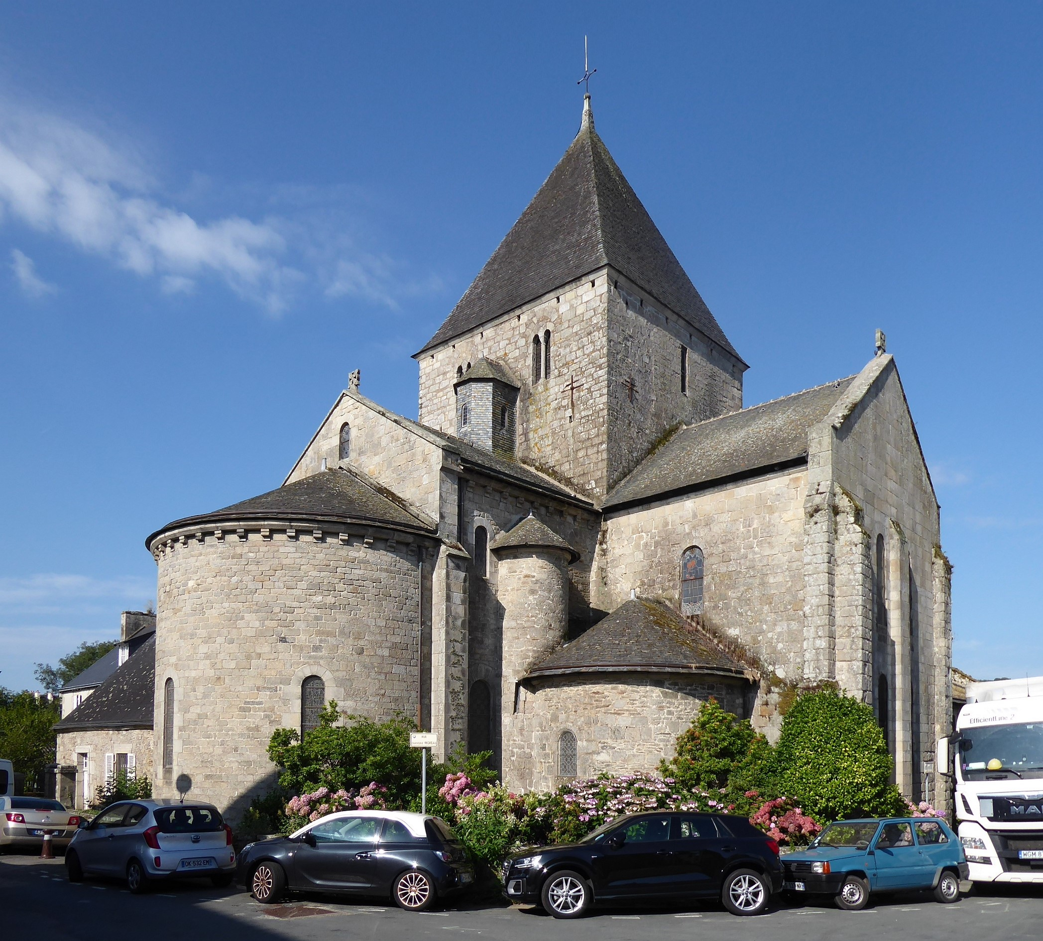 Eglise de Locmaria